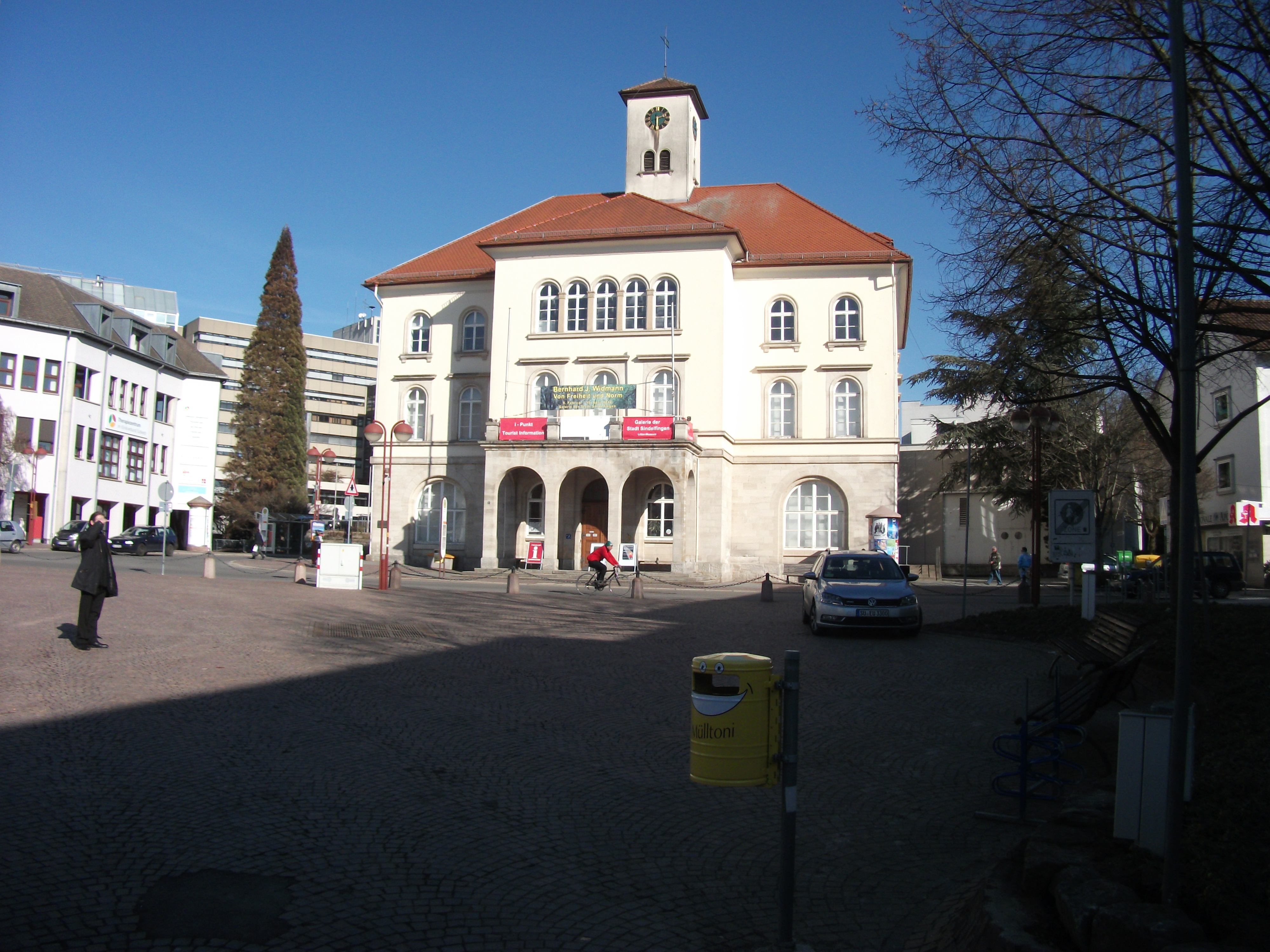 Mittleres Rathaus Sindelfingen, Westansicht